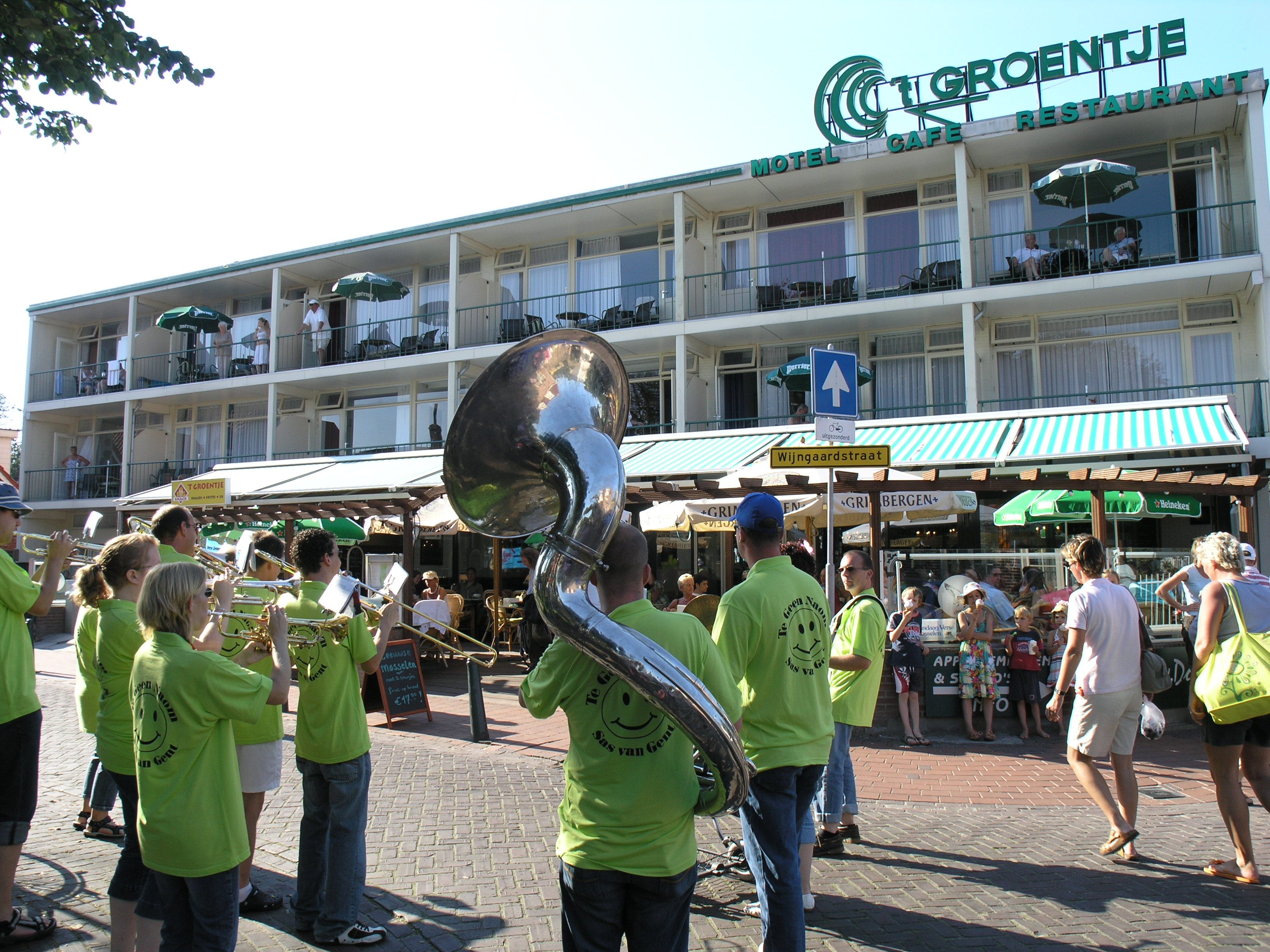 Domburg muziek op 't Groentje